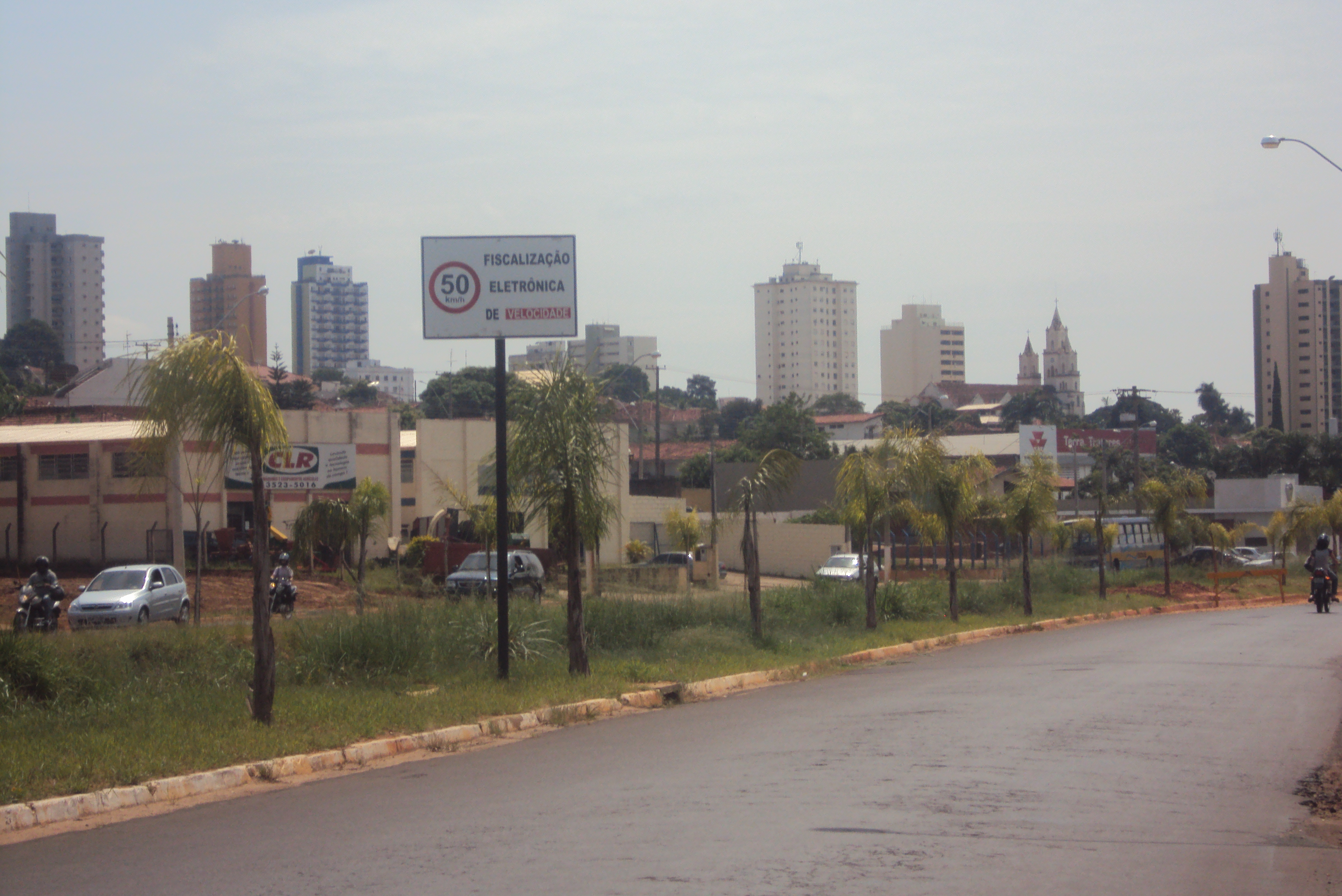 Avenida Tiradentes Lins-SP